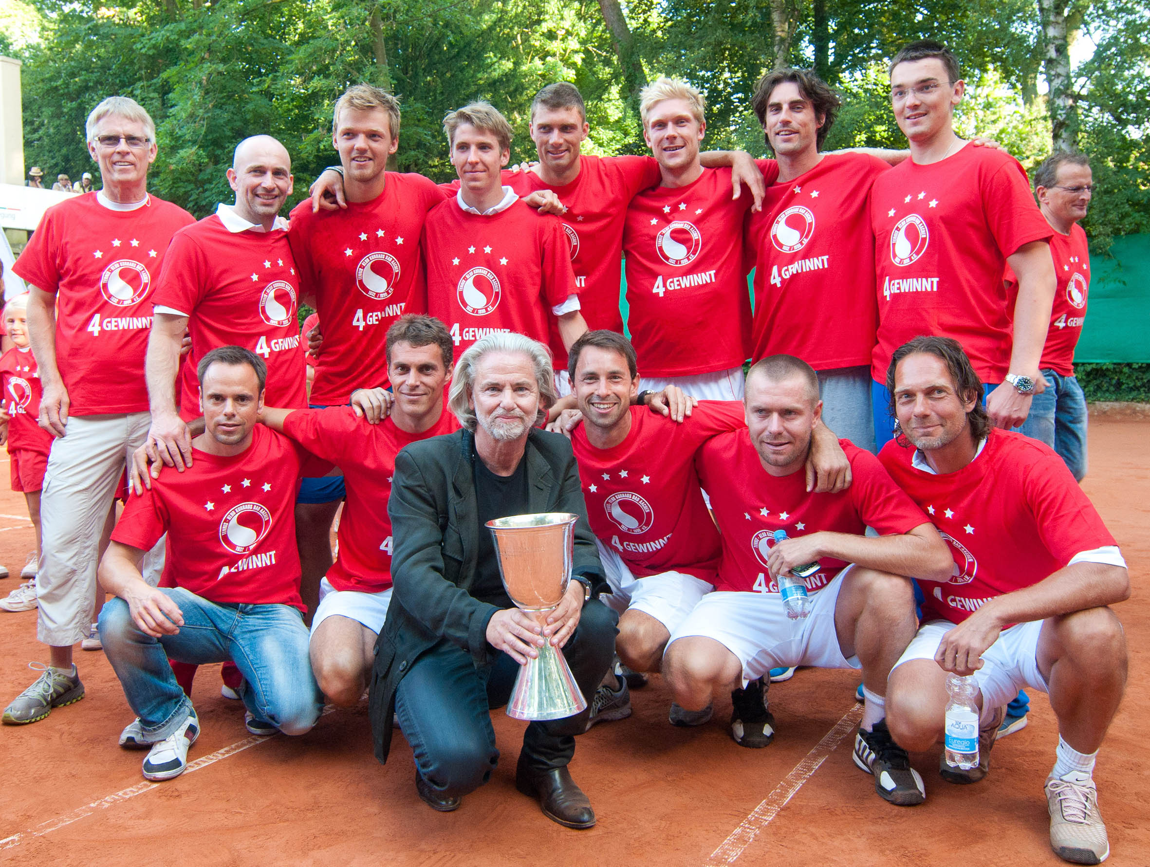 Dr. Hermann Bühlbecker (Lambertz-Inhaber und Hauptsponsor) mit den Spielern des TK Kurhaus Lambertz Aachen nach ihrem Sieg im Finale der ersten Tennisbundesliga der Herren 2012